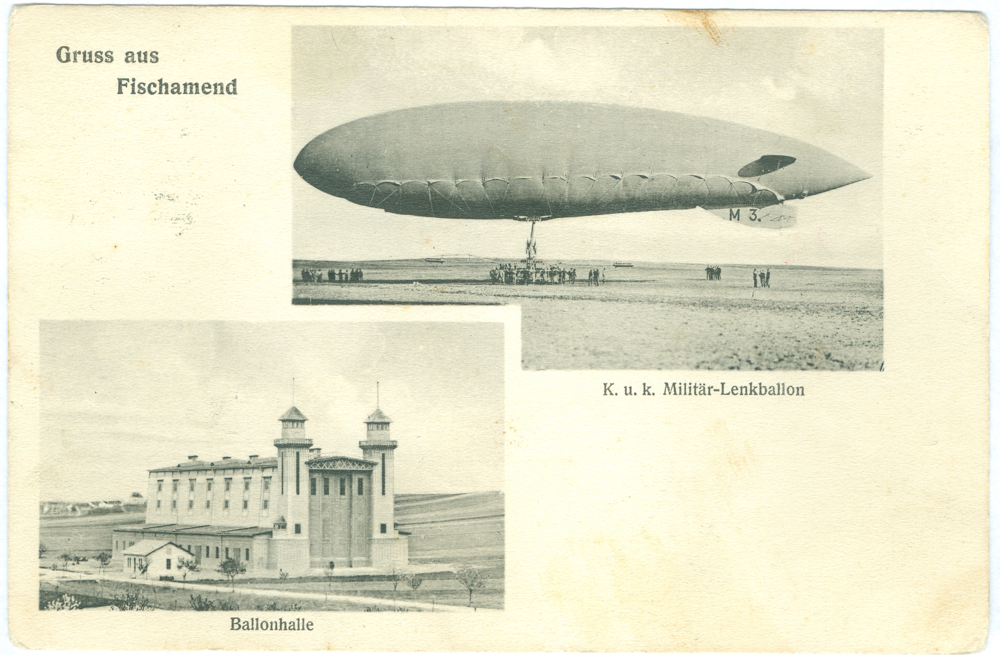 Ansichtskarte vor 1914 Luftschiff Körting mit Luftschiffhalle